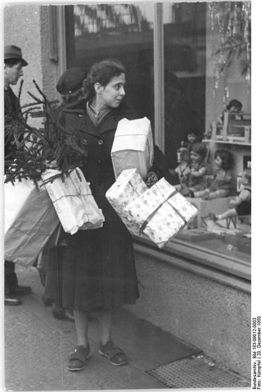 Berlin, Straßenszene, Weihnachtseinkauf Illus Kümpfel 20.12.50 Friedensweihnacht 1950 Die letzten Einkäufe bei der HO sind gemacht, nun kann die Bescherung losgehen. Leihweise Illus Berlin W8 x